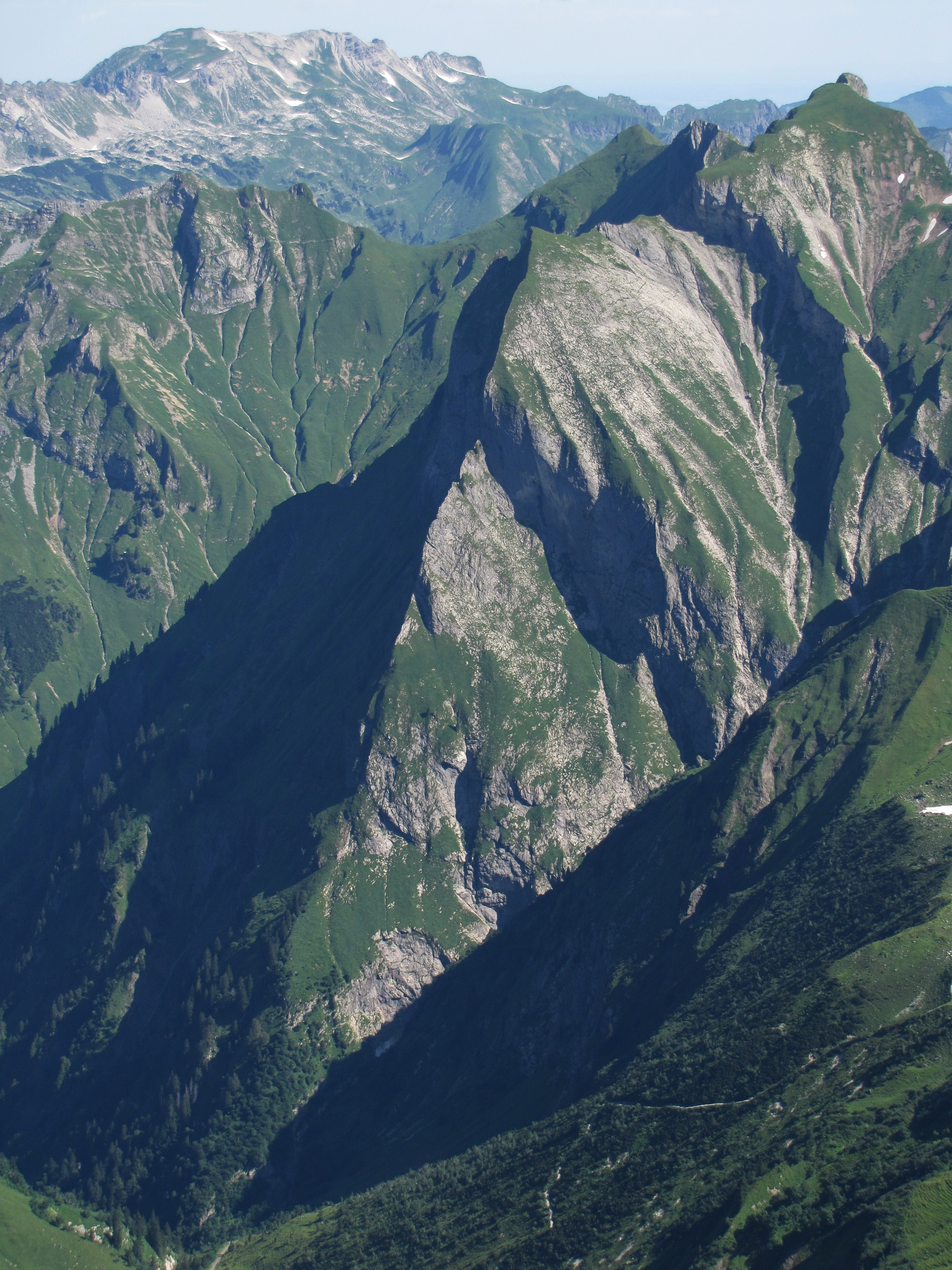 Blick vom Gipfel des Rauheck (2384 m) nach Norden auf den berühmt-berüchtigten Rädlergrat (V+ oder VI-, A2), der aus dem Oytal zum Himmelhorn (2111 m) emporzieht, von wo es zum Schneck (2268 m) weitergeht.